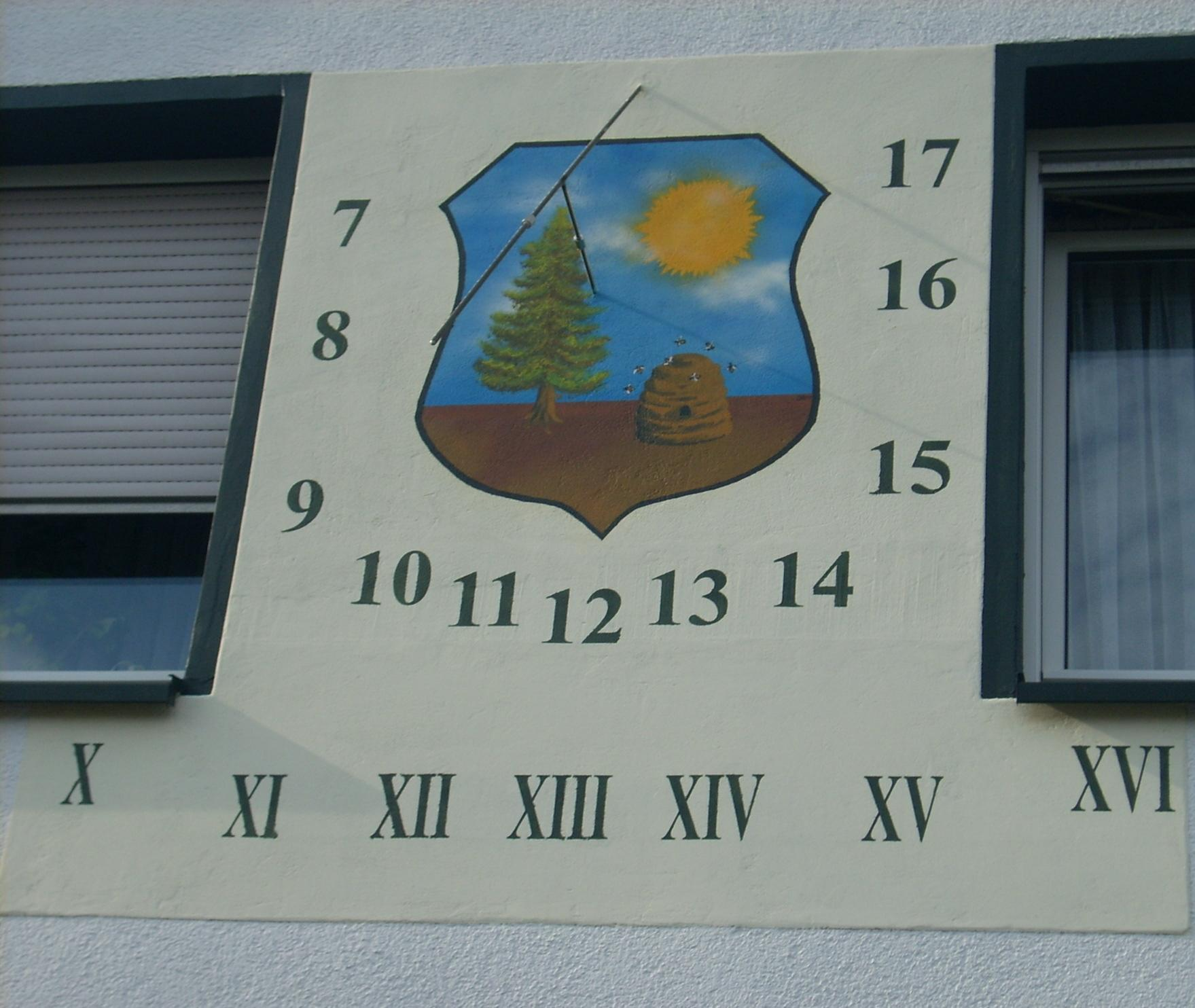 Sonnenuhr mit altem Ortswappen in Kurort Hartha